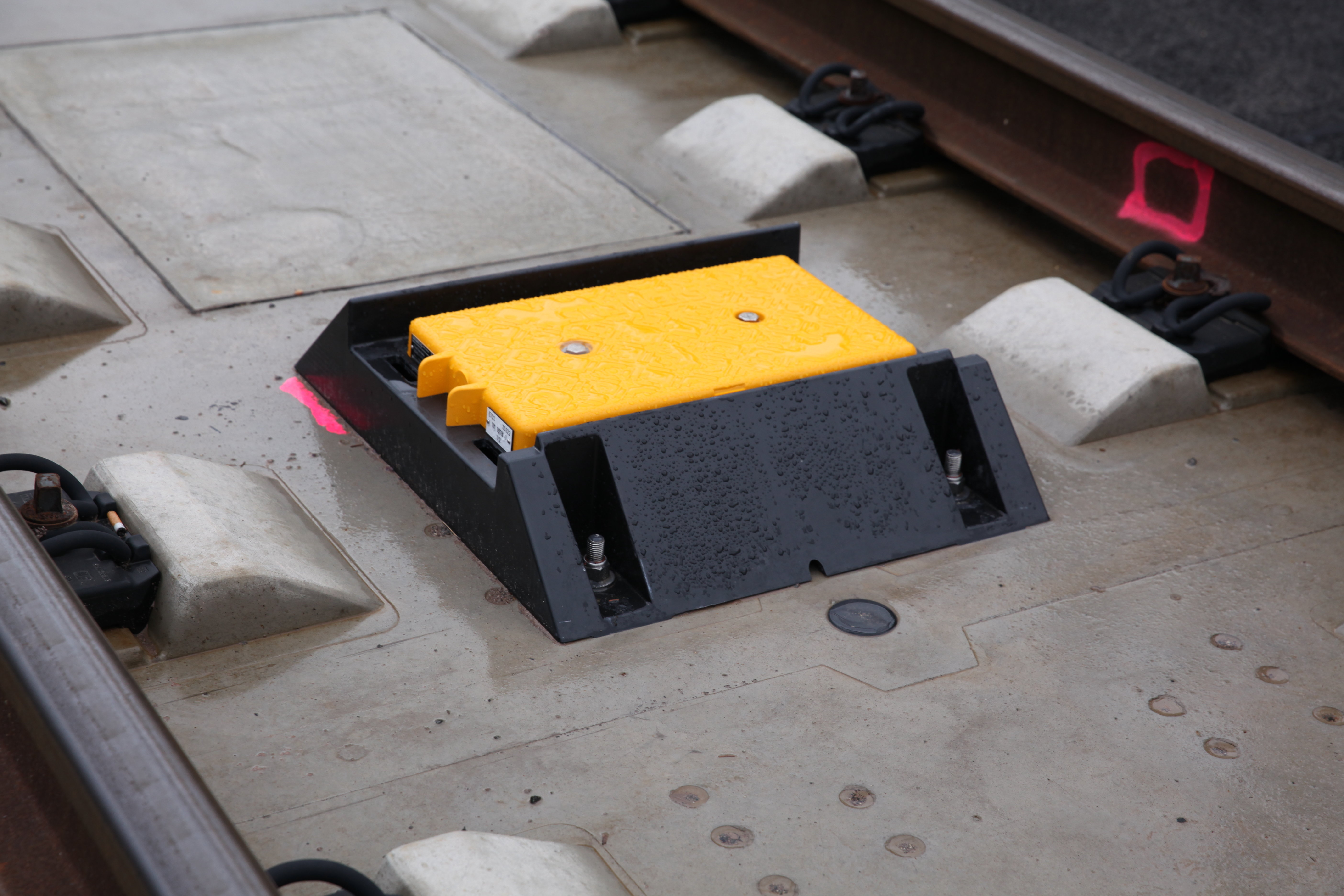 Eurobalise auf der NBS Ebensfeld-Erfurt, am Schaltposten Niederfüllbach